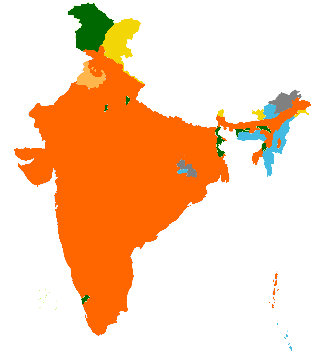 Religions map of India